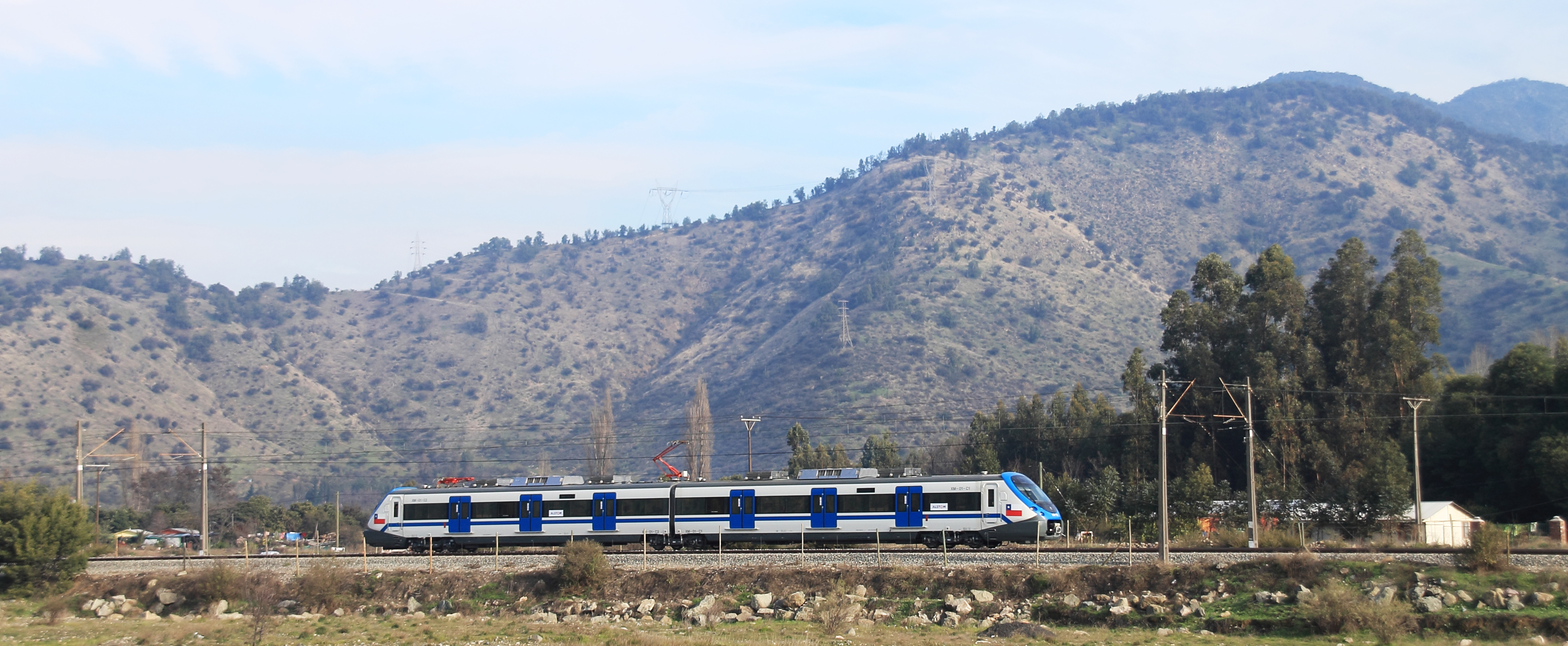 Lo que será, una imagen muy común en un tiempo mas en las vías del Rancagua Xpress. Automotor Xtrapolis Modular XM-01 de Alstom pasando a gran velocidad por la zona de Aguila Sur, Angostura.